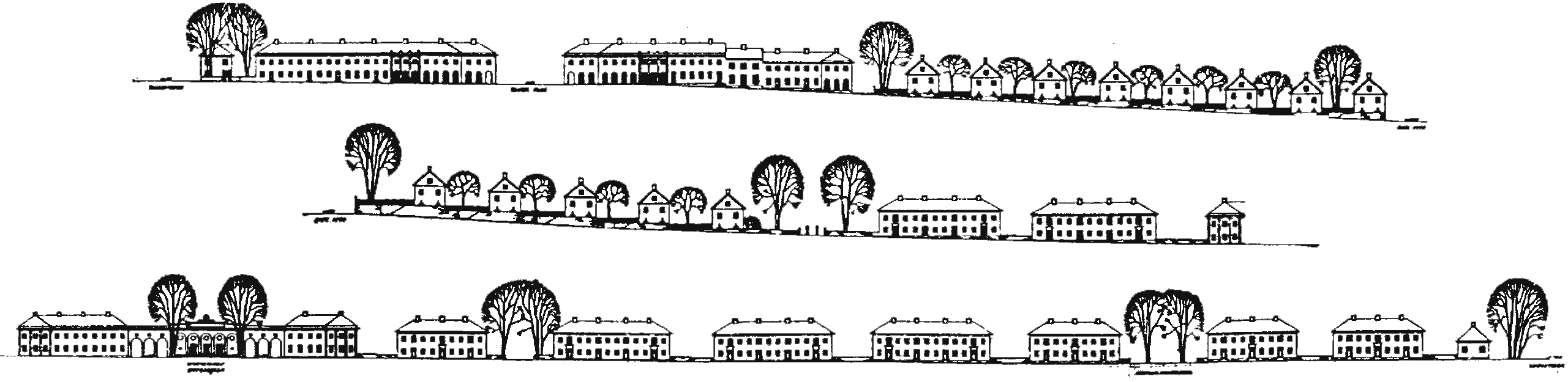 Sogn haveby, silhuett av hovedgaten